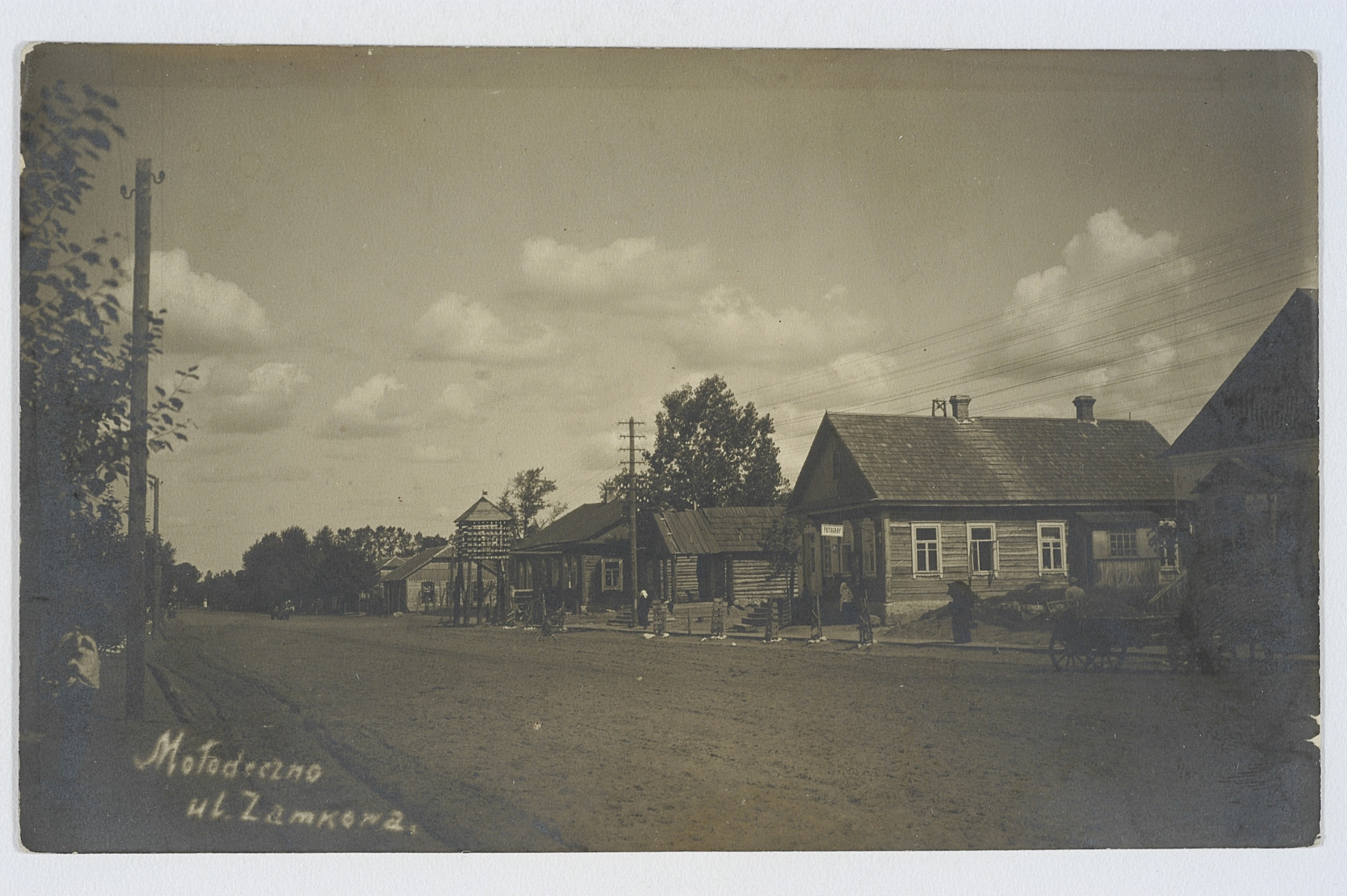 Беларуская (тарашкевіца): Маладэчна (Maładečna), вуліца Замкавая (vulica Zamkavaja)